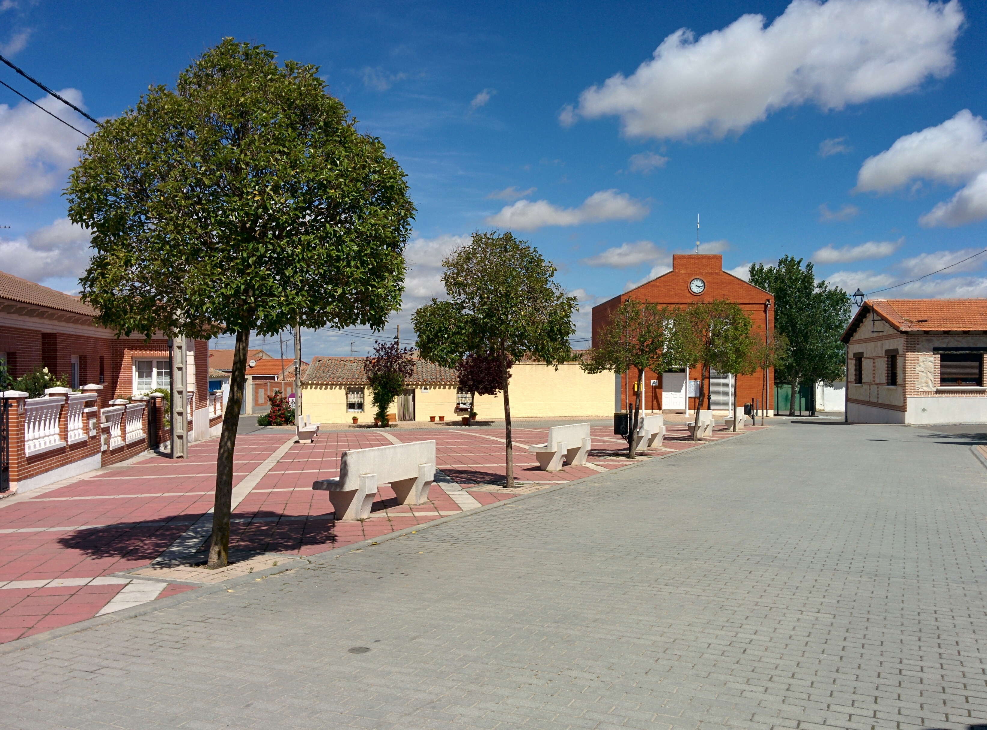 Plaza en Velascálvaro (Valladolid, España).